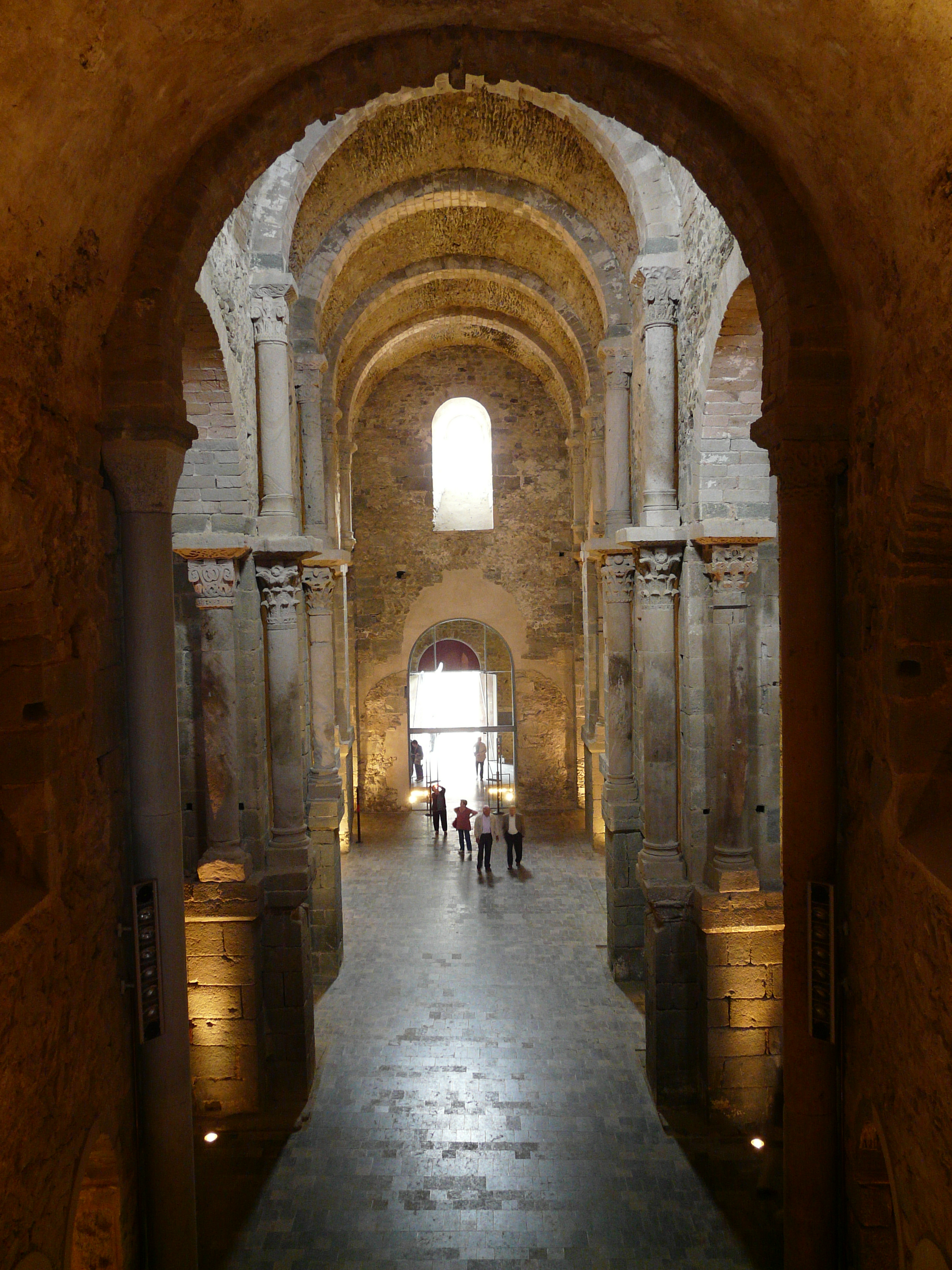 Monestir de Sant Pere de Rodes (el Port de la Selva) Object location42° 19′ 23.85″ N, 3° 09′ 58.46″ E